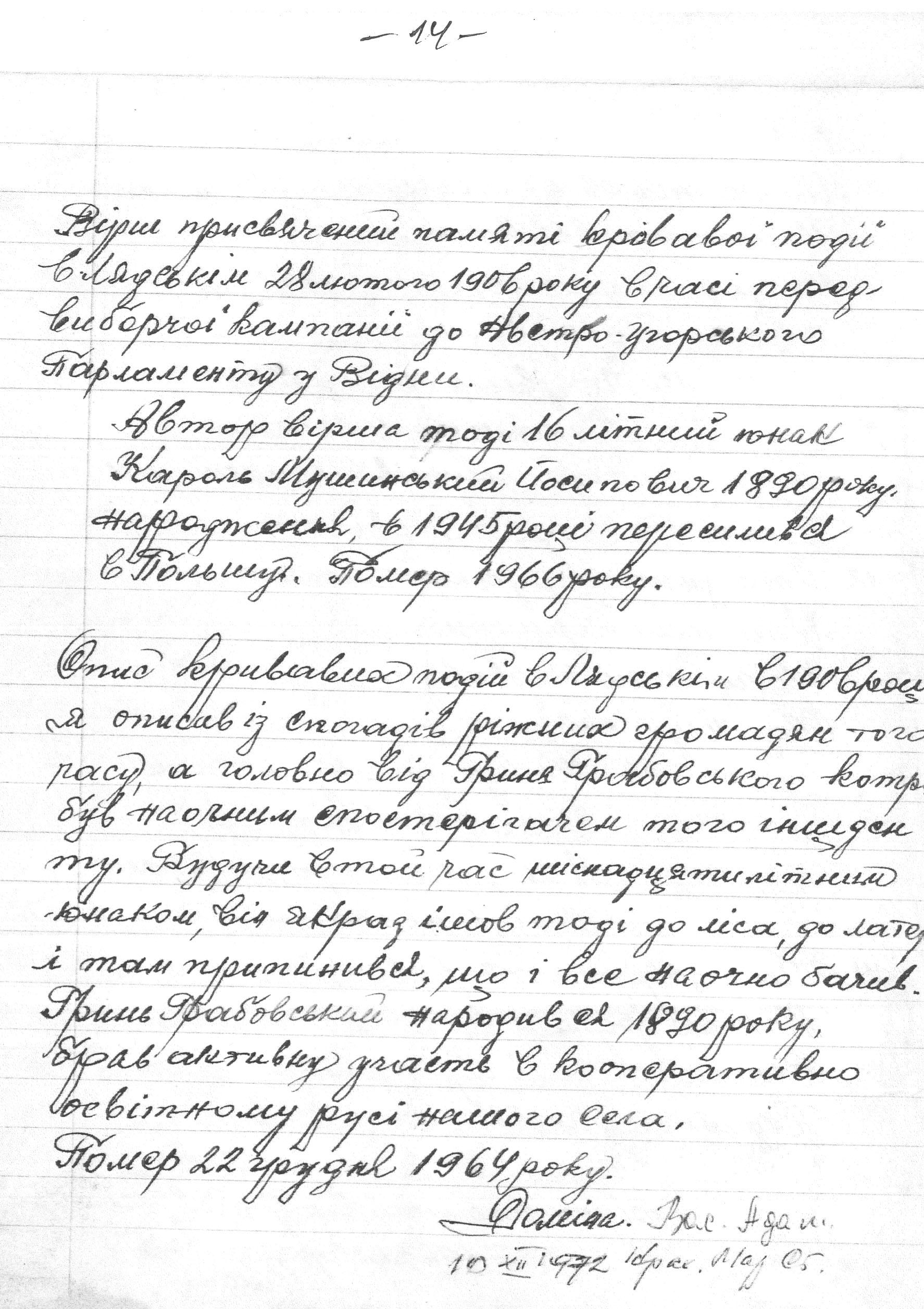 Копія рукопису